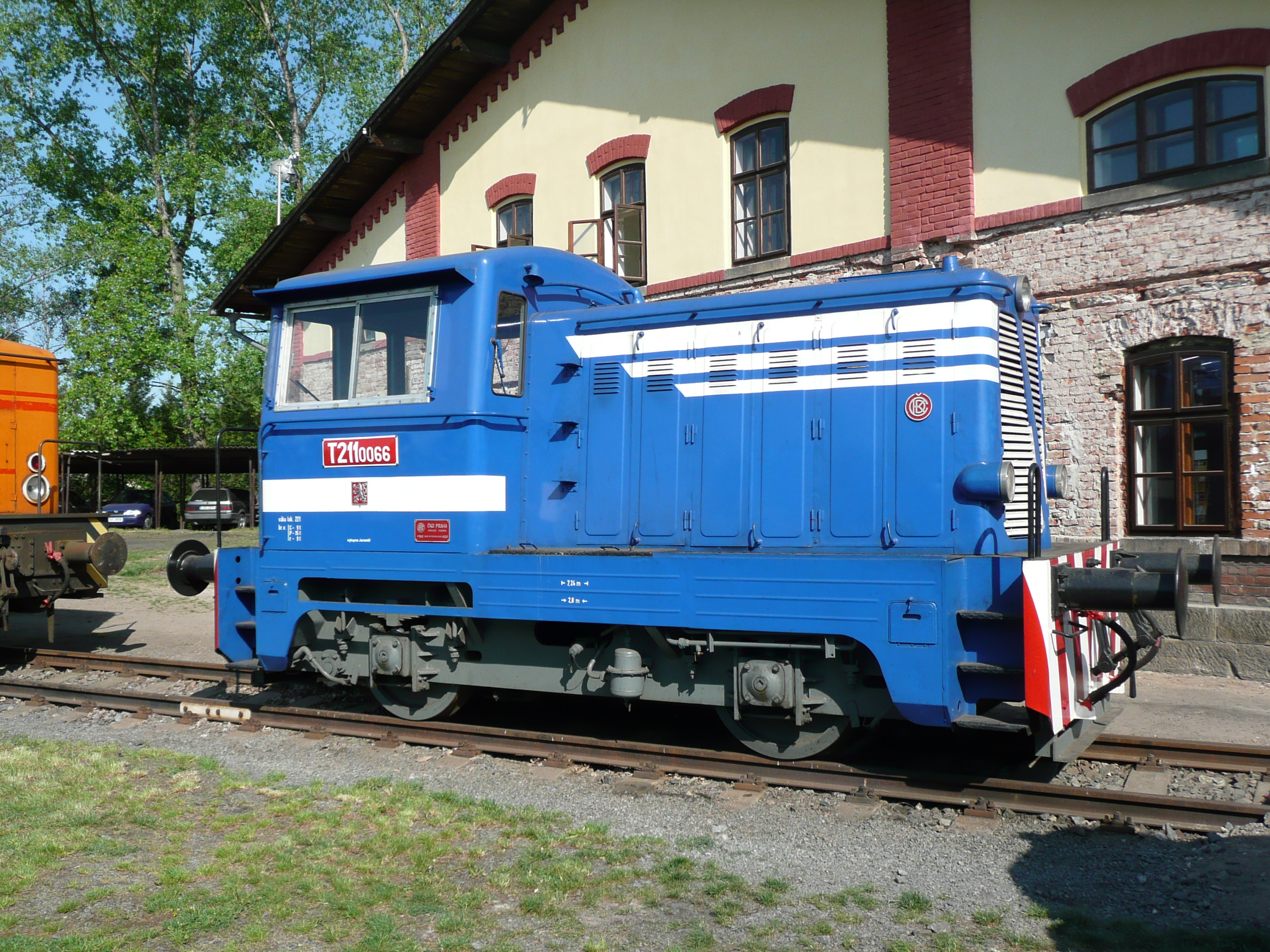 T 211.0066 im Eisenbahnmuseum Jaroměř